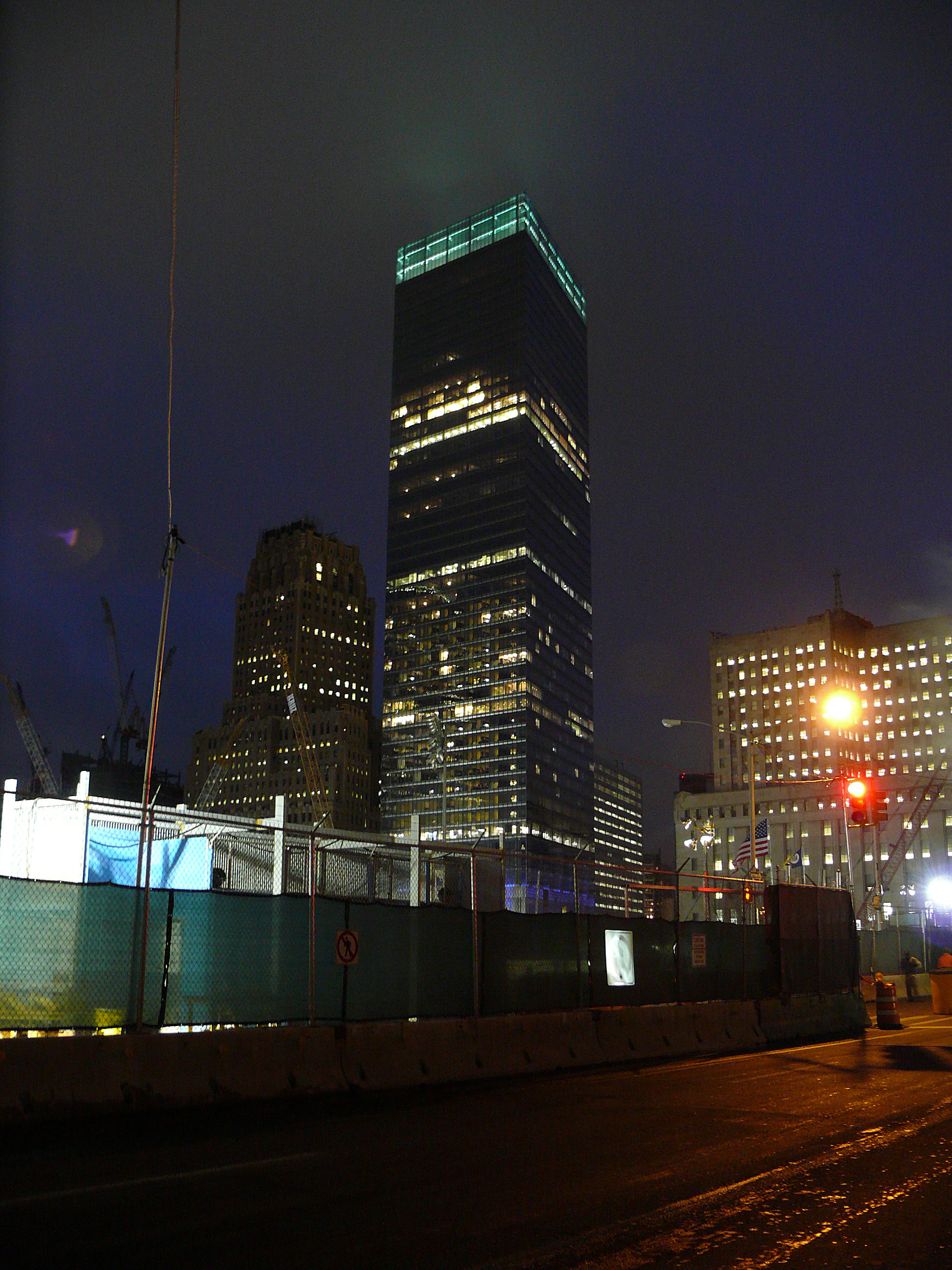 Edifici 7 WTC .